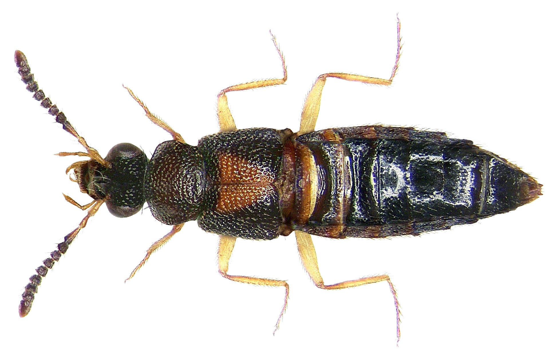 Familie: Staphylinidae Grösse: 6 mm Fundort: Kenia, Tsavo National Park, Voi Lodge leg. U.Schmidt, 1991; det. R.Pace, 2007 Foto: U.Schmidt, 2008